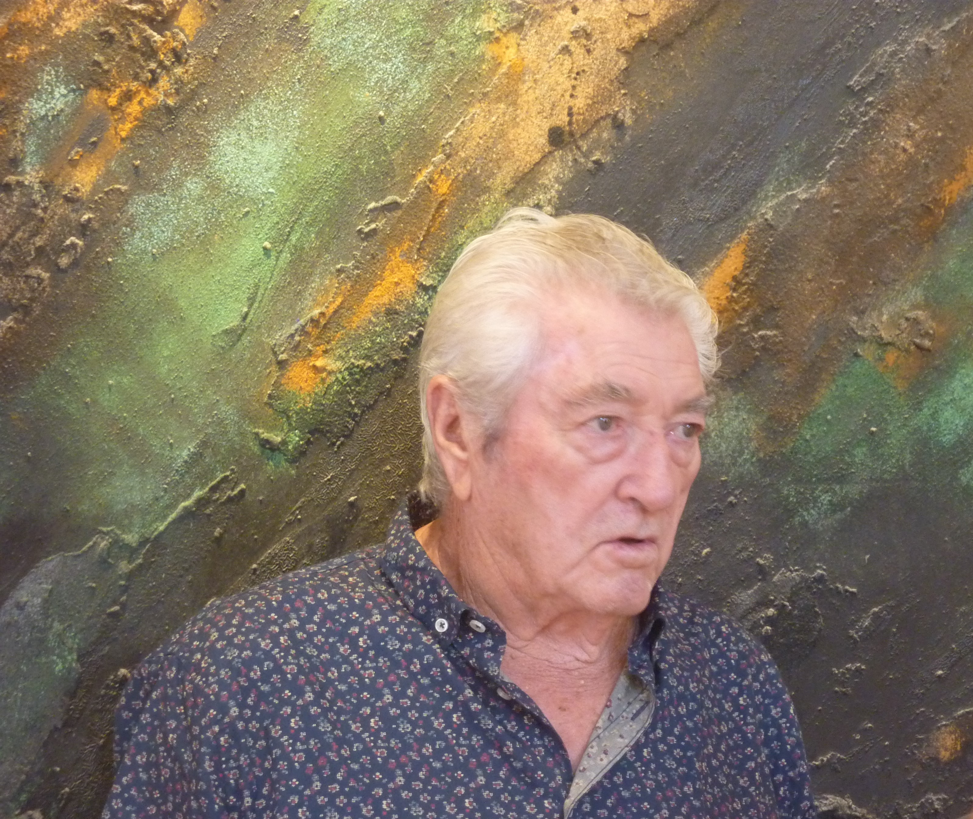 Gilbert Ganteaume, exposition "Le massif du Sec", 10.2019